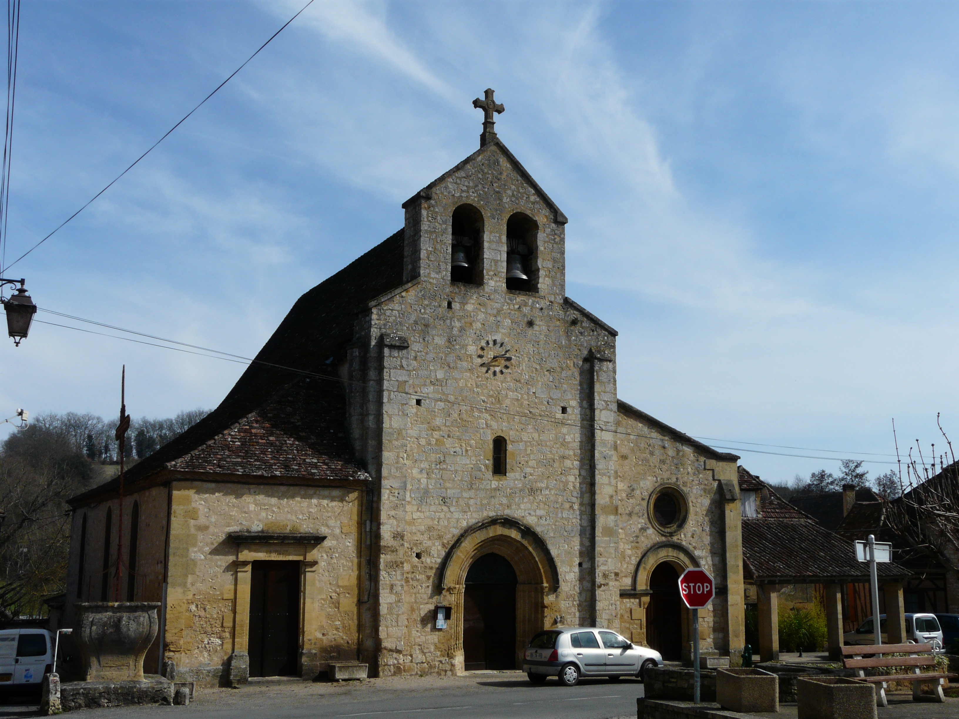 L'église Notre-Dame-de-l'Assomption, Lanquais, Dordogne, France.